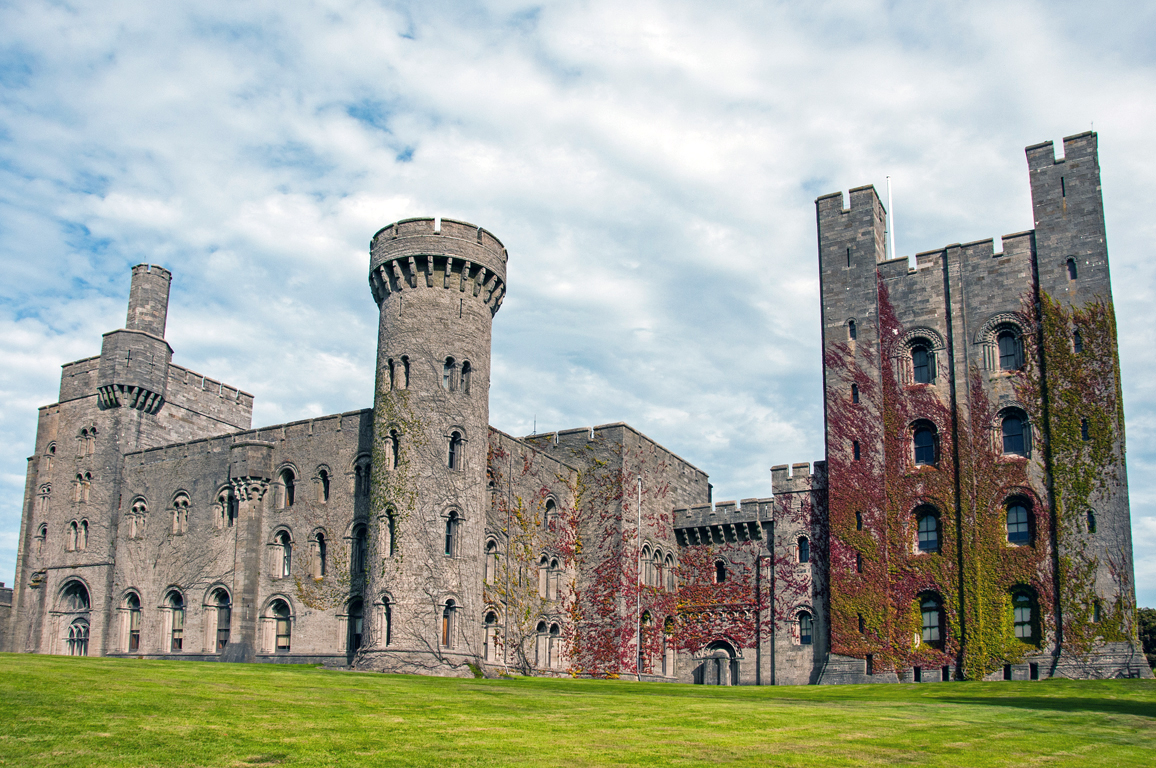 Penrhyn Castle - Exterior 2